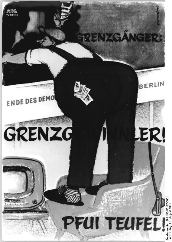 ADN-ZB-3.8.1961- Plakat zur Entlarvung der Grenzgänger von Leo Haas.